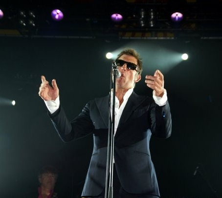 Huub van der Lubbe, singer of Dutch group De Dijk, performing live in Sint Anthonis.